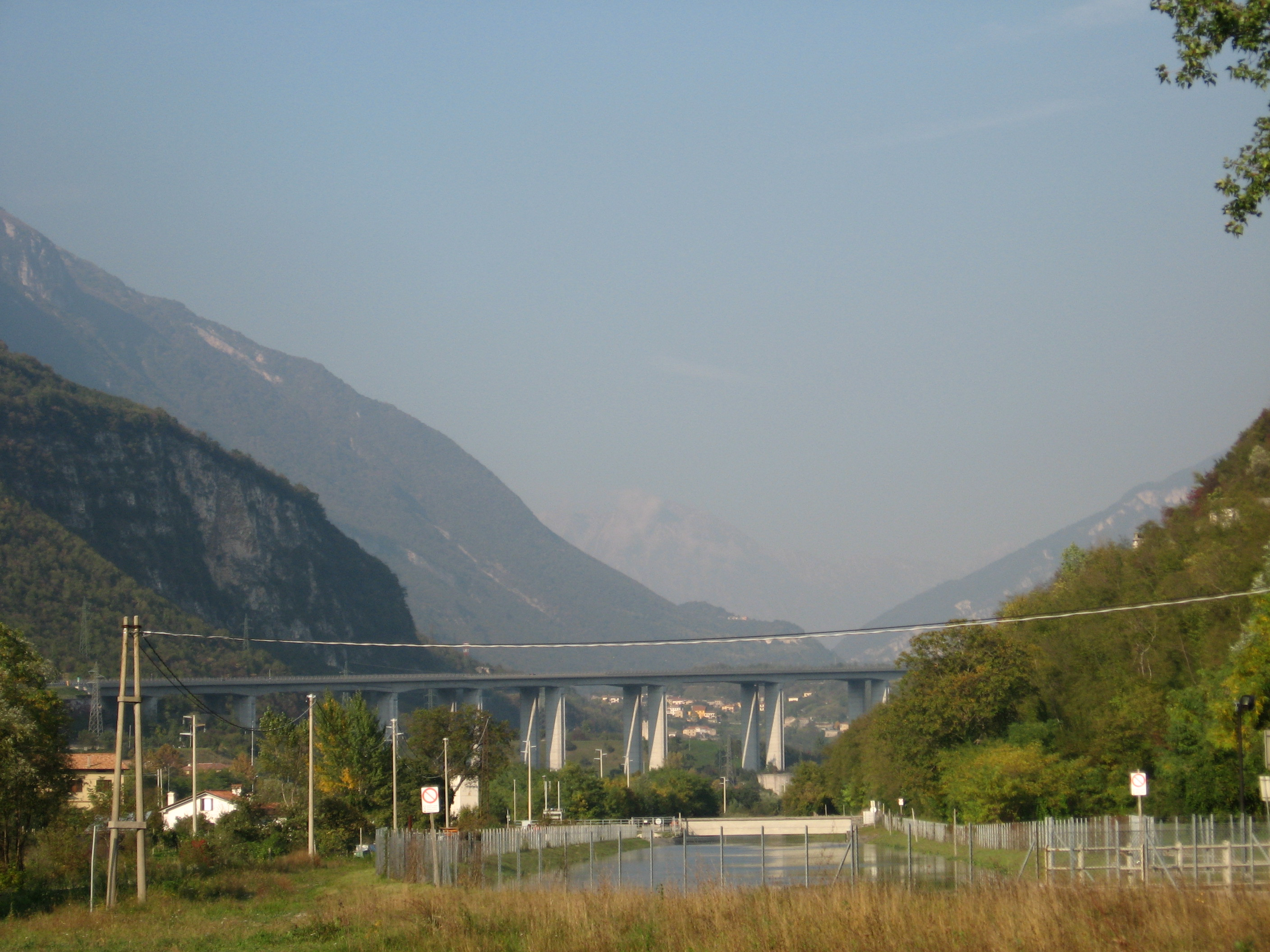 La Val Lapisina vista da Negrisiola. In evidenza il notevole impatto antropico.